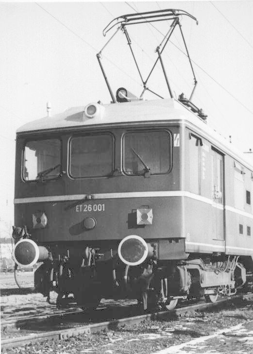 DB Triebzug ET 26 001 in München Hbf